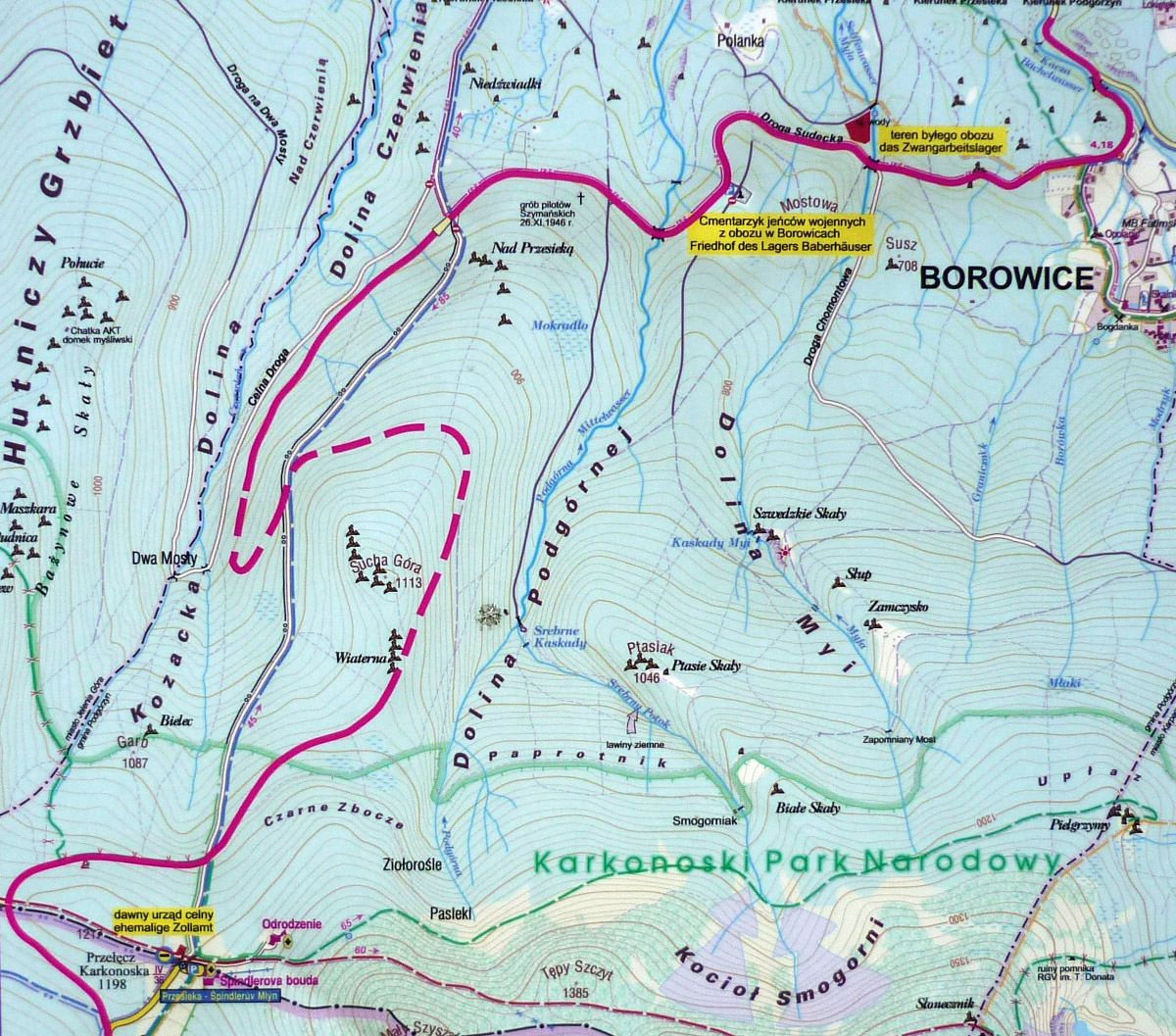 Plan der Sudetenstraße (Abschnitt der geplanten Spindlerpass-Straße) bei Baberhäuser/Hain (Borowice/Przesieka) im Riesengebirge